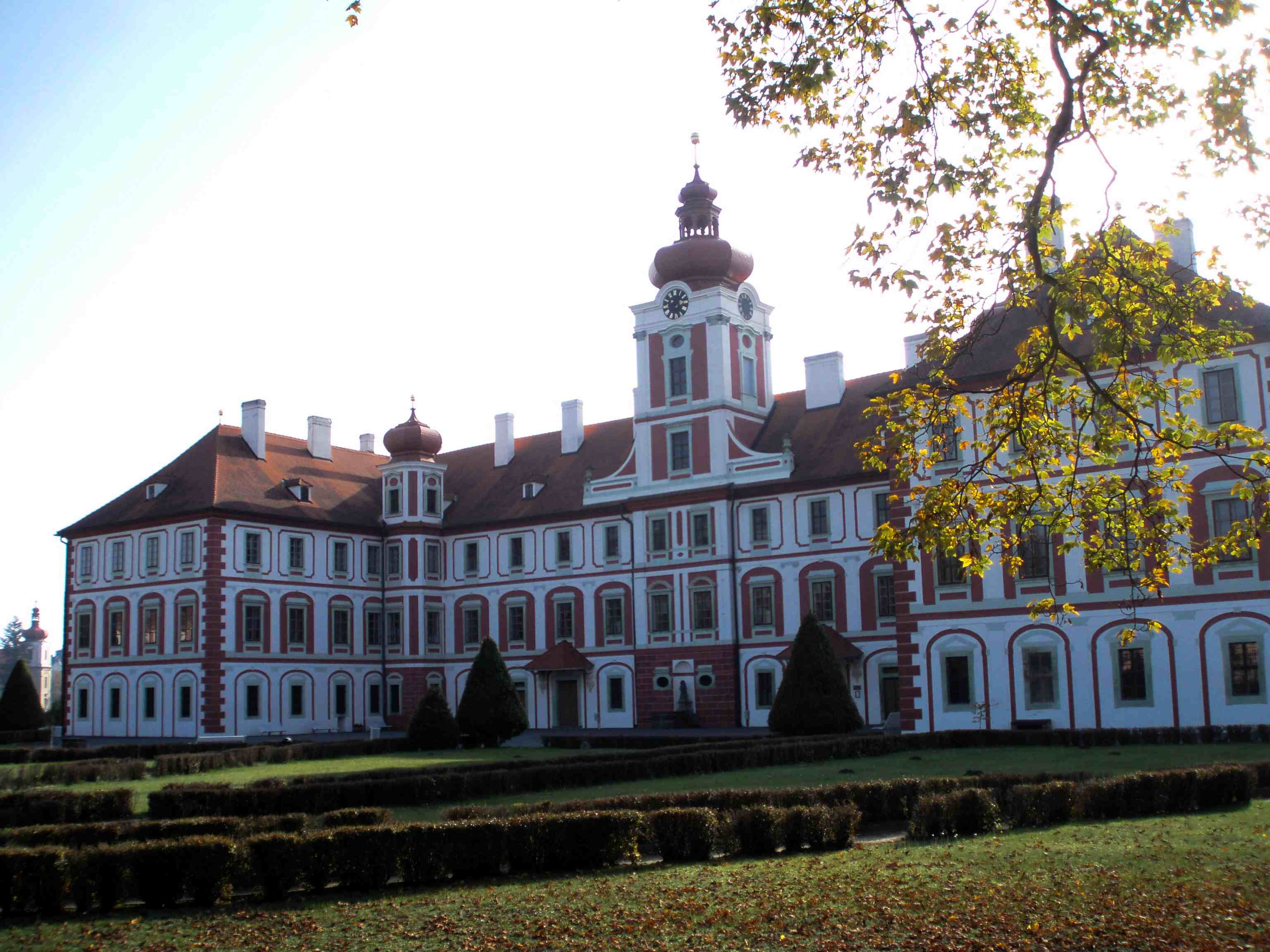 Schloss Münchengrätz